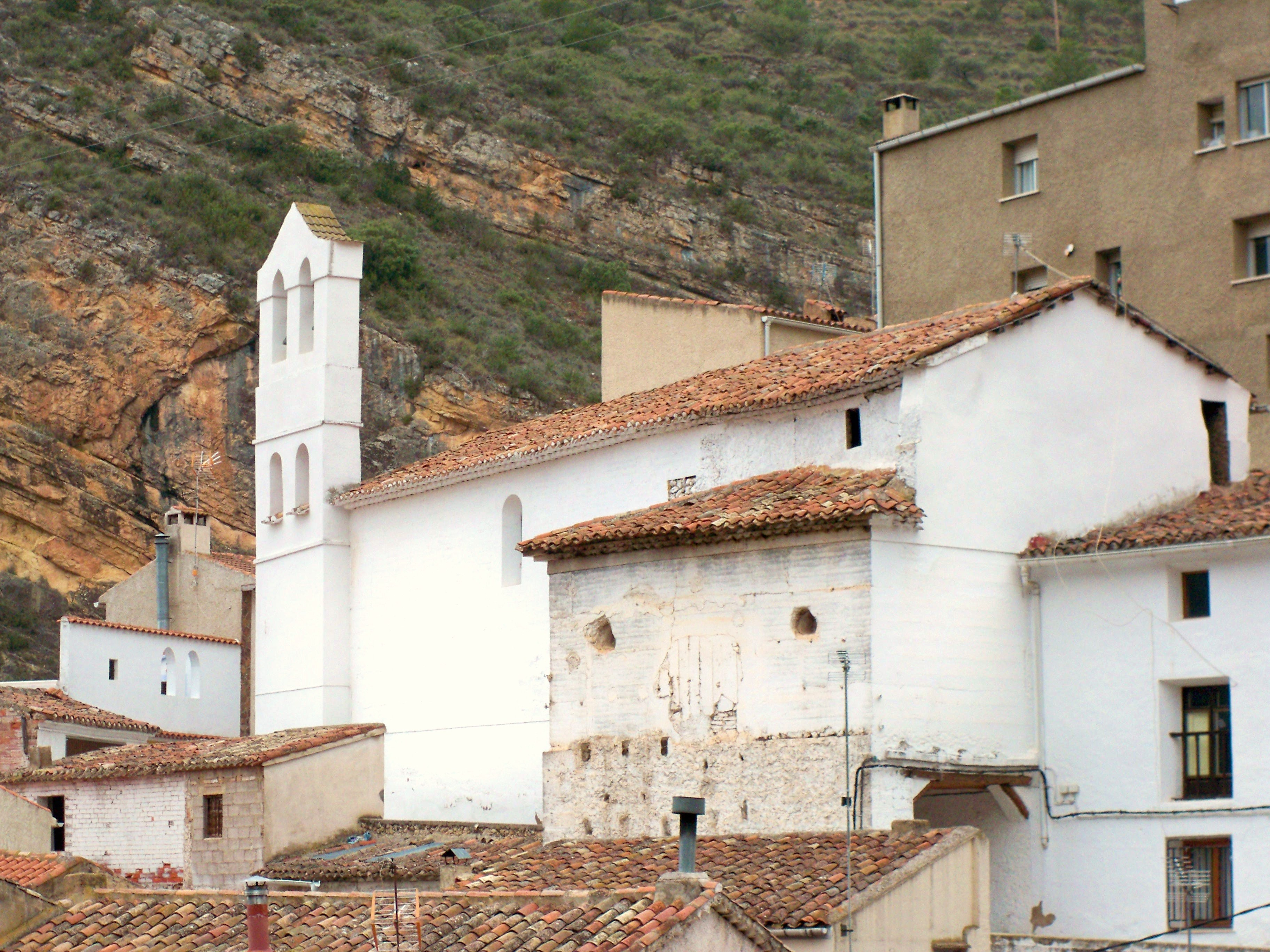 Vista de la Iglesia de San José de Molinicos (Albacete)